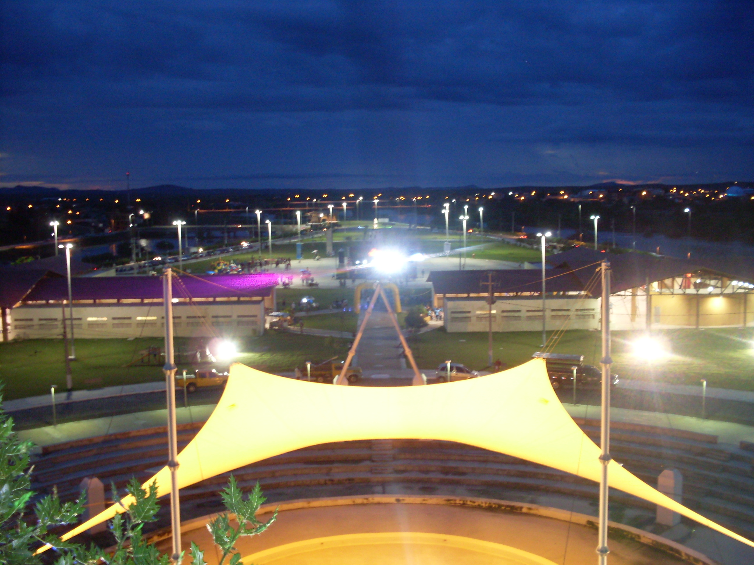 Ilha de Santana de Caicó, RN, Brasil.